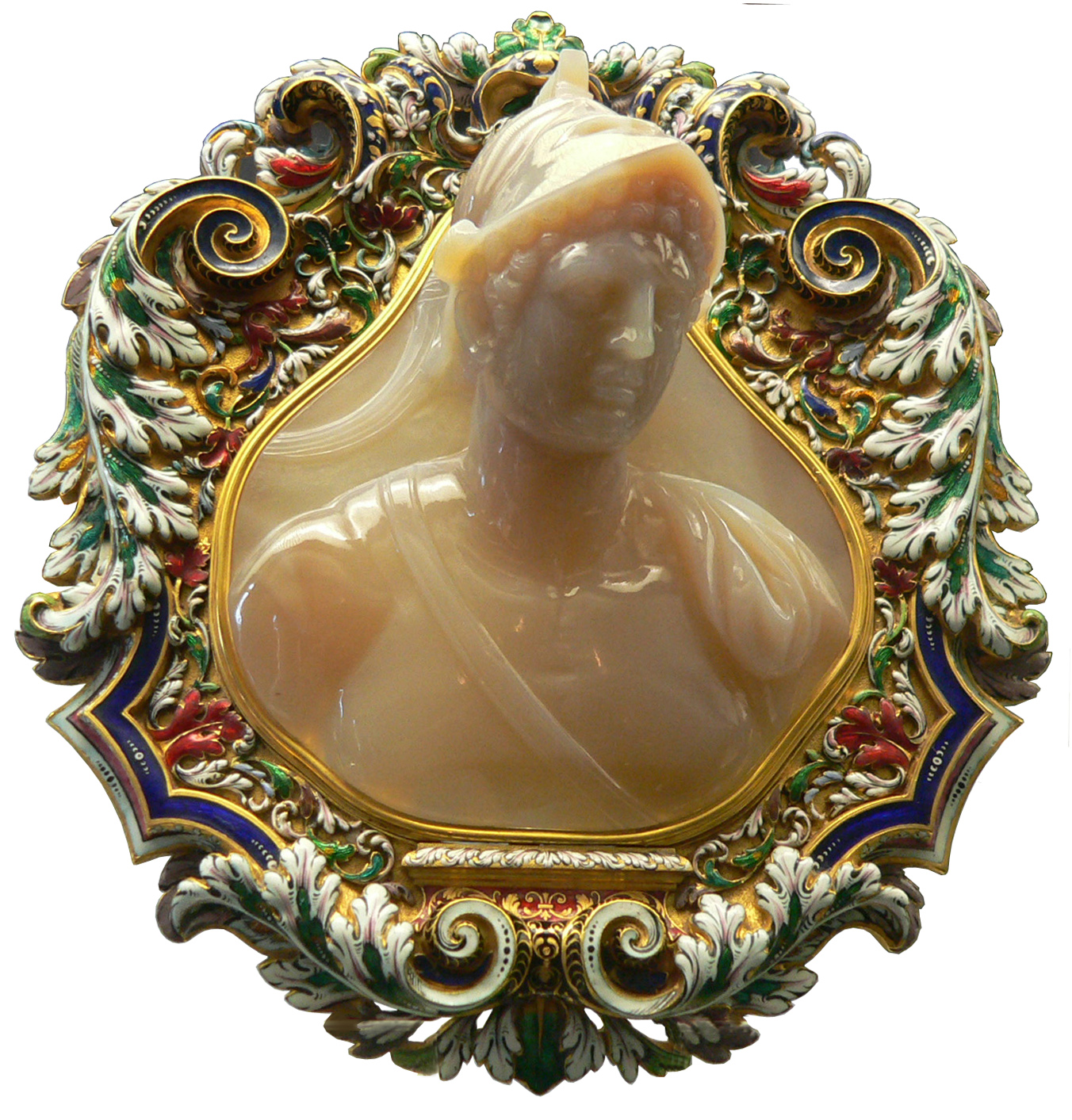 Camée représentant Ptolémée II assimilé à Alexandre le Grand. Camée en calcédoine grise. Alexandrie? 2e tiers du IIIe siècle av. J.-C. Monture en or émaillé de l'orfèvre Josias Belle, Paris, fin du XVIIIe siècle